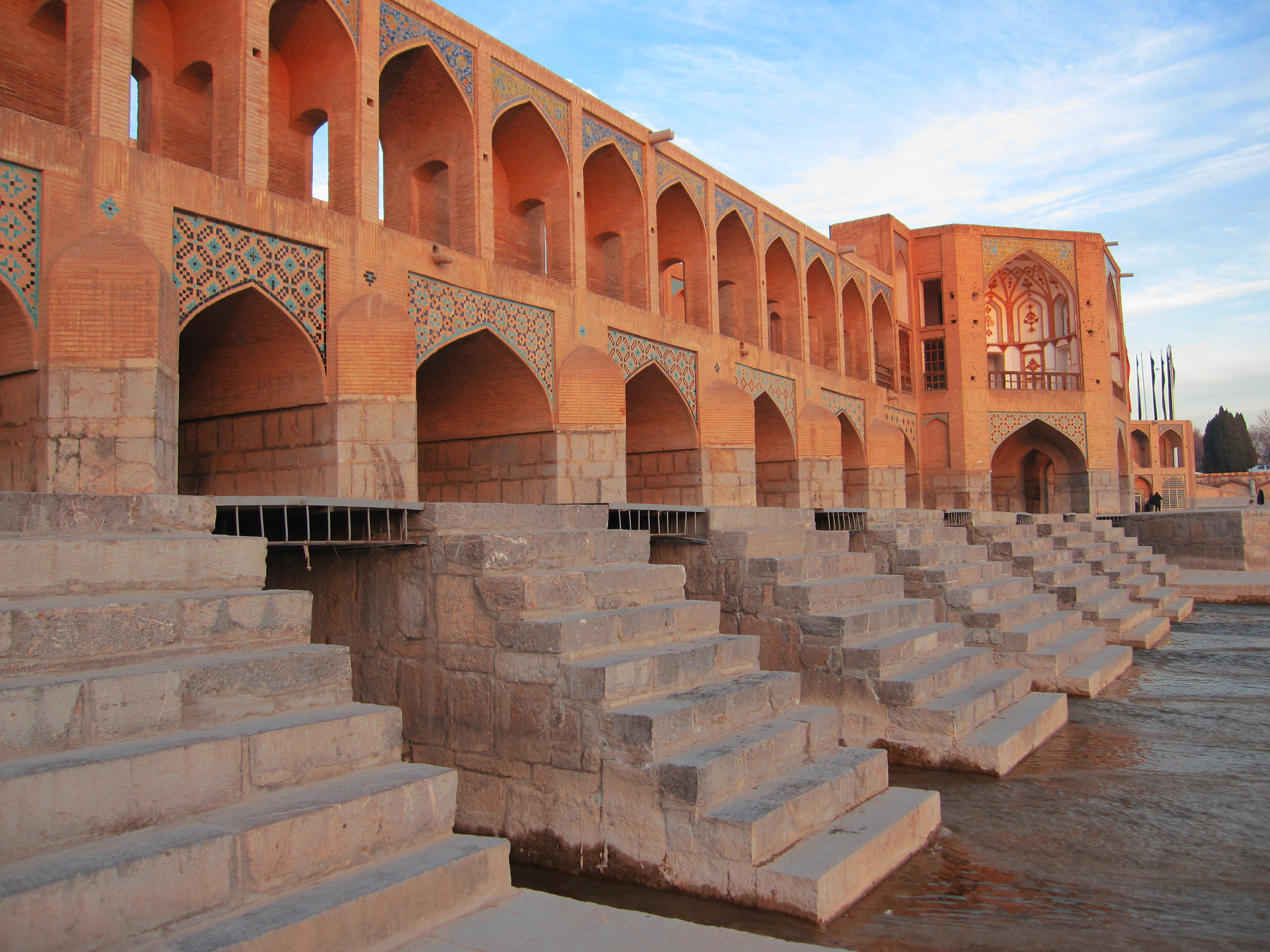 Isfahan - Khajoo Bridge